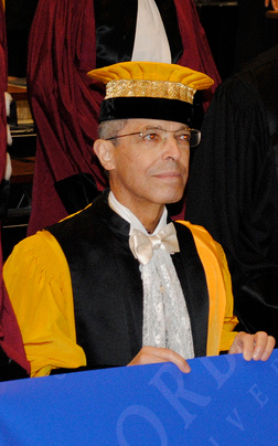 Georges Molinié lors de la remise des diplômes de docteurs de Sorbonne universités le 14 mai 2011.